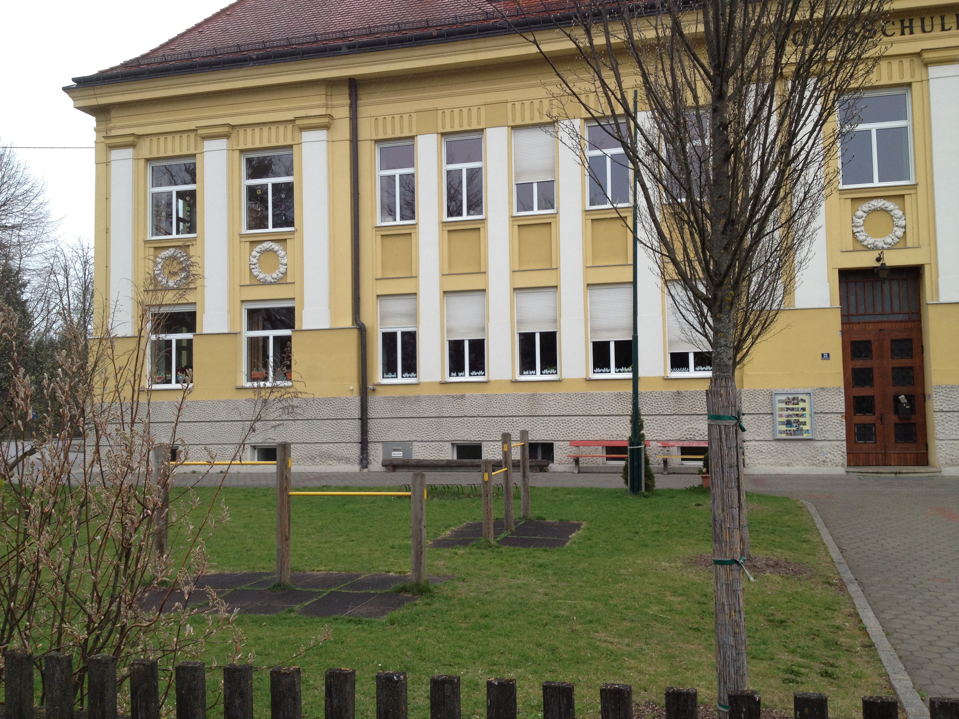 Schulgarten